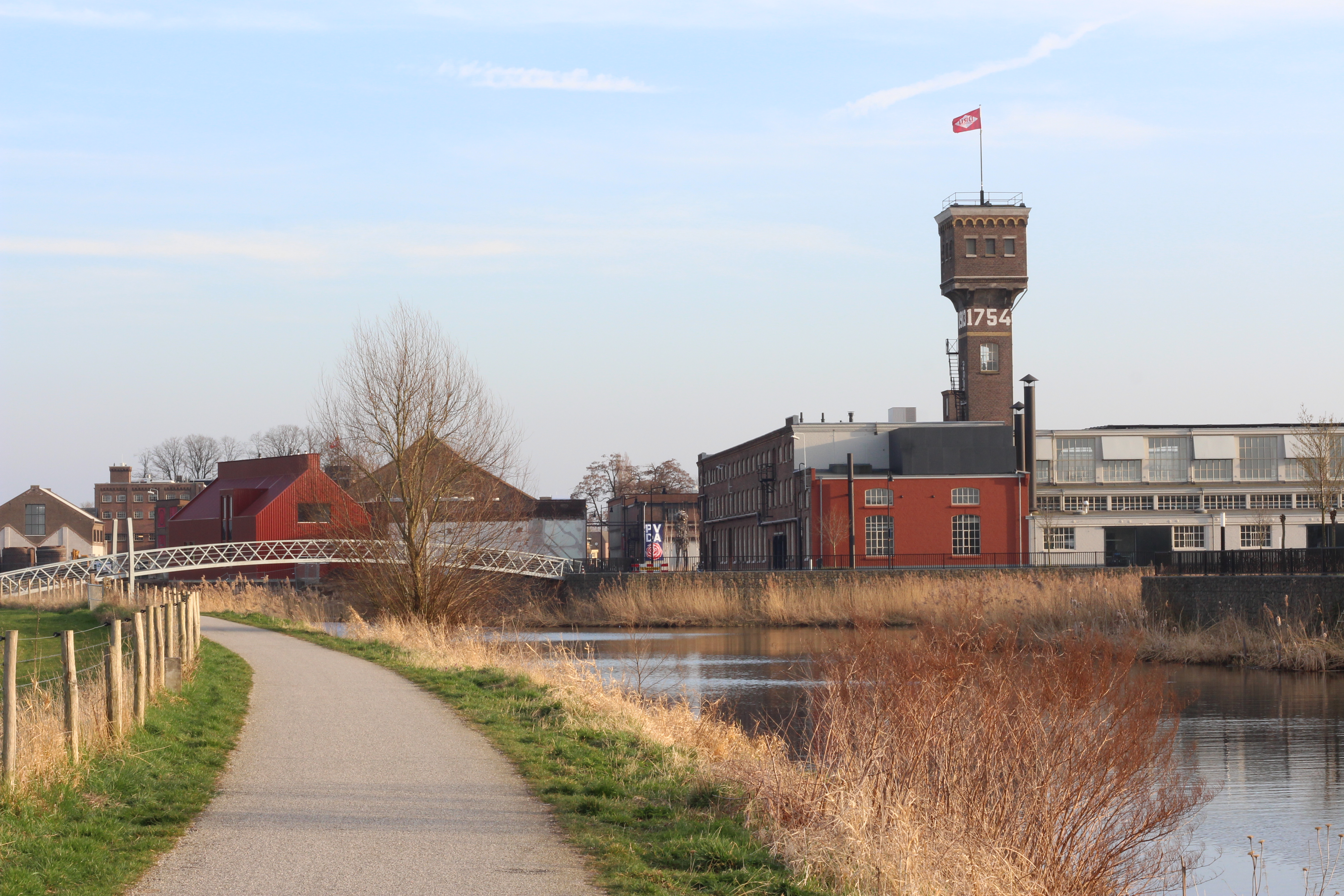 DRU, Ulft.